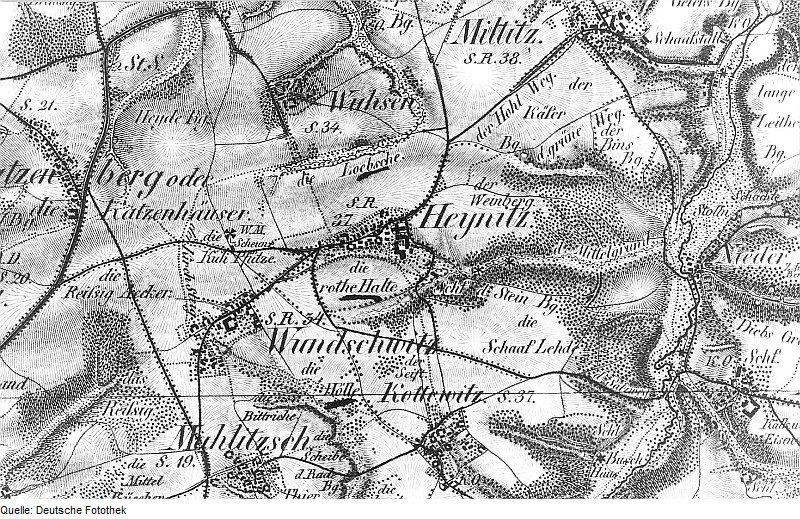 Original image description from the Deutsche Fotothek Nossen-Heynitz. Ausschnitt aus: Oberreit, Sect. Freiberg, vor 1843